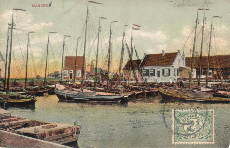 Briefkaart uit eigen verzameling Dolph Kohnstamm. Briefkaart draagt geen auteurs- of uitgeversvermelding. Afbeelding gemaakt in het eerste decennium van de 20e eeuw. Onbekende auteur vermoedelijk meer dan 70 jaar geleden overleden.